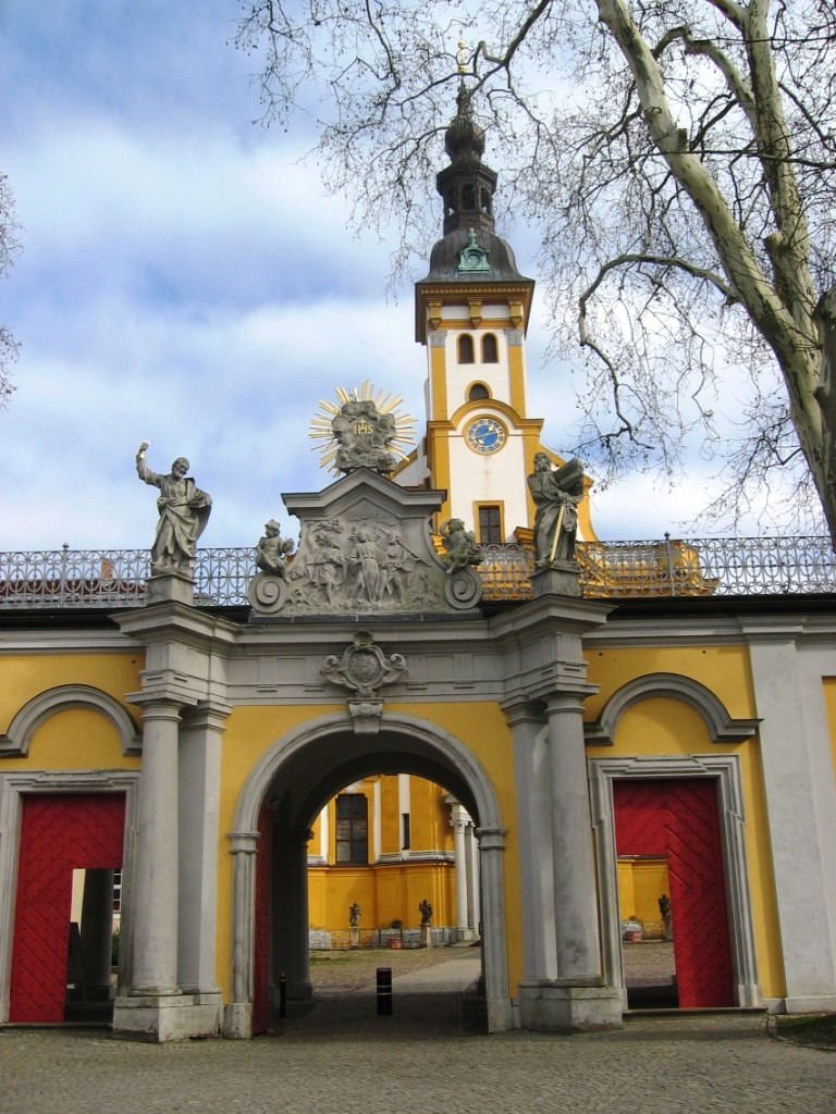 Eingangsbereich zum Kloster Neuzelle